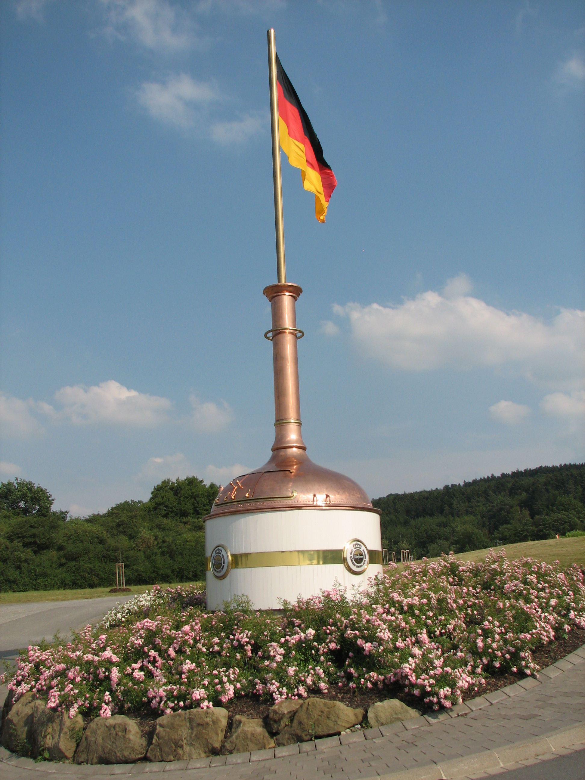 Besucherzentrum der Warsteiner Brauerei